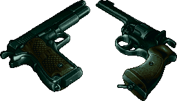 Pistolas de los personajes masculinos y femeninos respectivamente